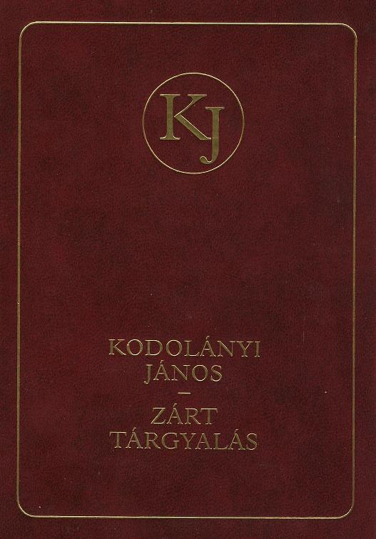 A Zárt tárgyalás c. Kodolányi-könyv 2003-as kiadásának borítója